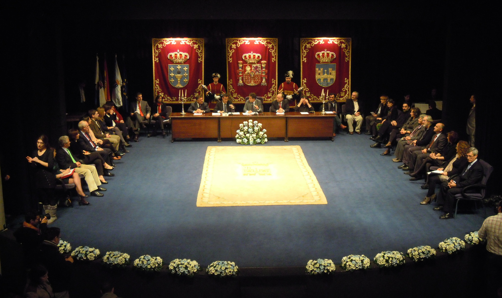 Corporación municipal de Pontevedra nun pleno celebrado no Teatro Principal o gl:20 de xaneiro, día do patrón local.